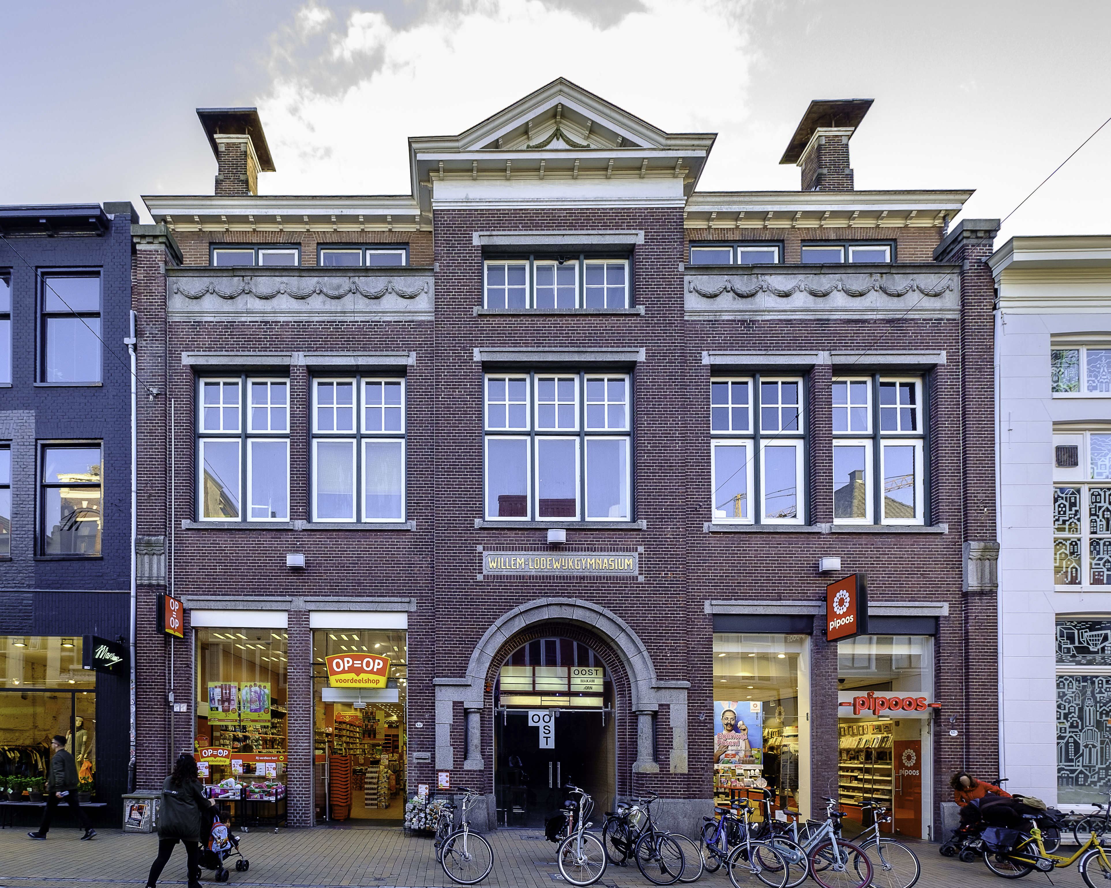 Voormalig gebouw van het Willem Lodewijk Gymnasium aan de Oosterstraat 11. Tussen 1972 en 2007 fungeerde de poort als toegang tot de Willem Lodewijkpassage naar de Gelkingestraat.